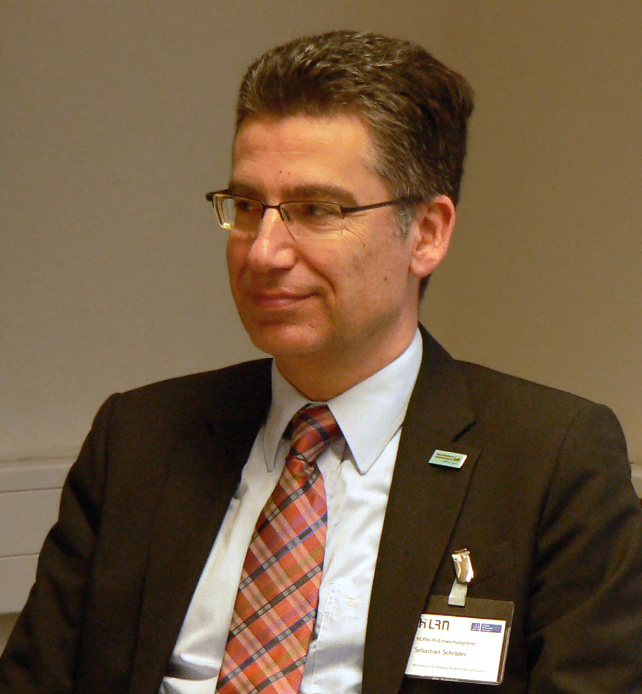 Staatssekretär Sebastian Schröder bei der Inbetriebnahme des Supercomputers HLRN-III in der Leibniz Universität Hannover bei einer Pressekonferenz